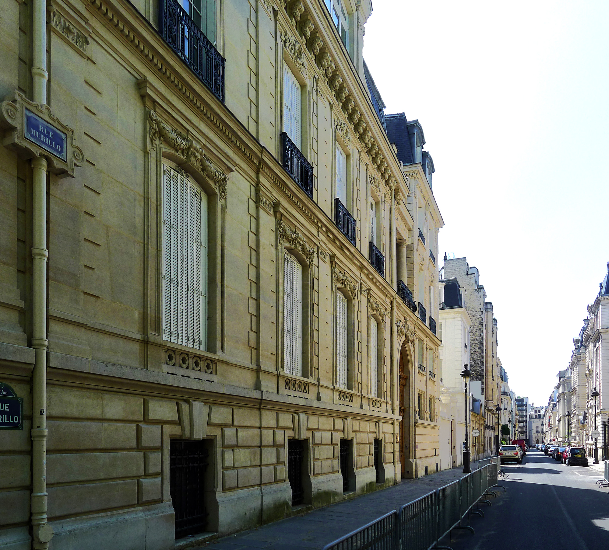 Rue Murillo - Paris VIII